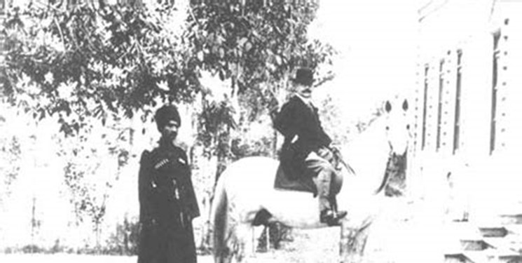 رضا پهلوی پیش از اشتغال در مناصب دولتی به نگهبانی اصطبل سفارت هلند اشتغال داشت